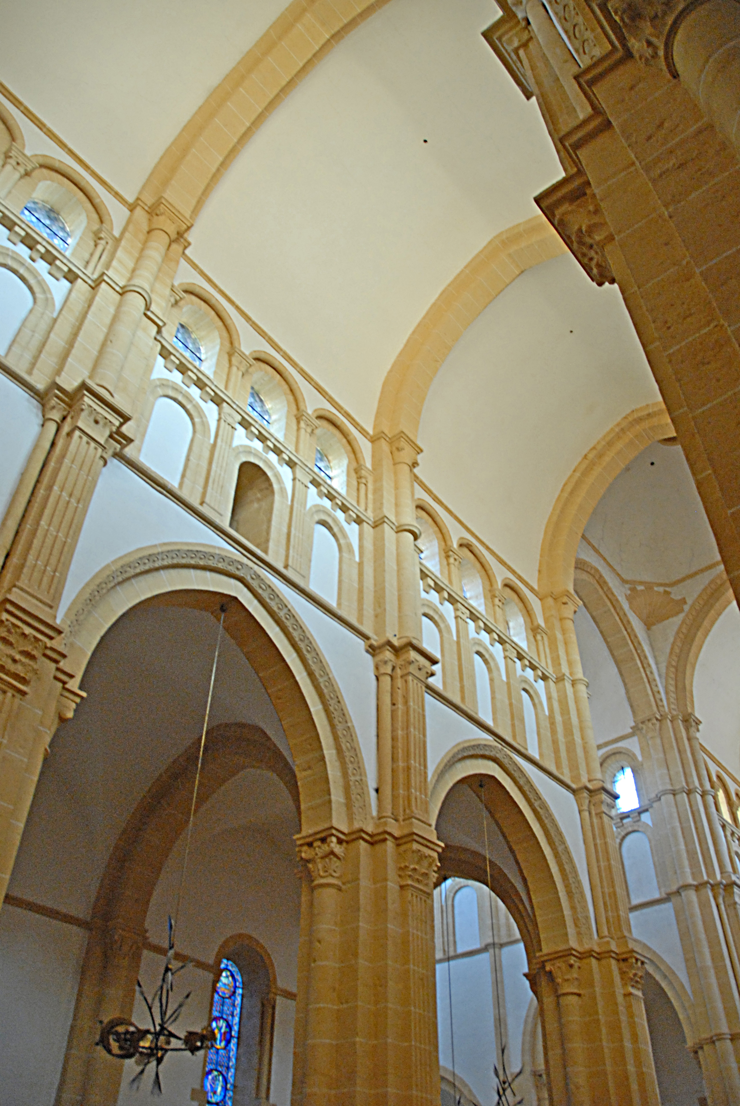 Mittelschiff Nordwand